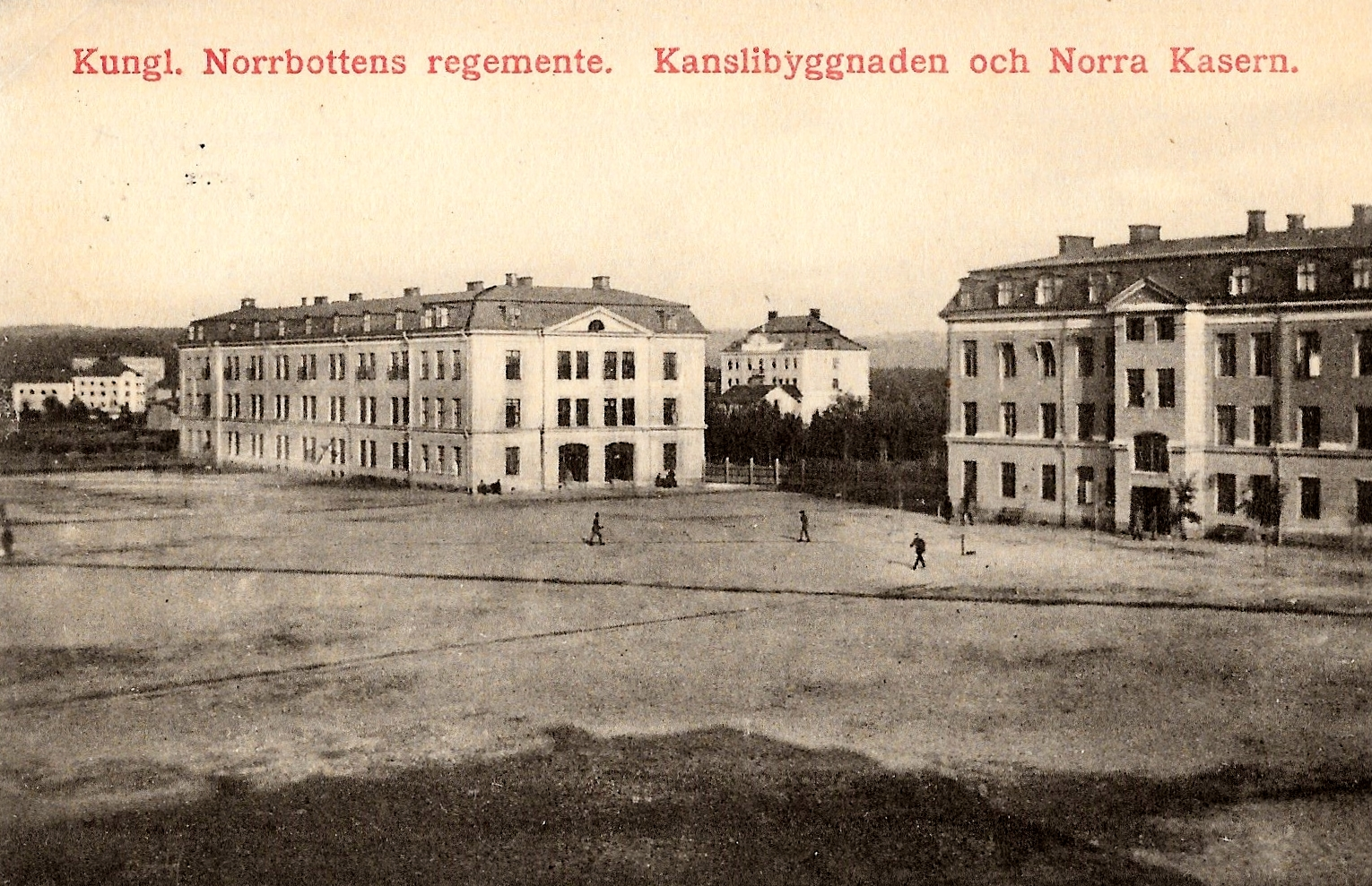 Norra kasern samt kanslihuset vid Norrbottens regemente, Norrbottensvägen i Boden. I bakgrunden mellan Norra kasernen och kanslihuset syns Kommendantbyggnaden. Till vänster om Norra kasernen skymtas intendenturkasernerna.